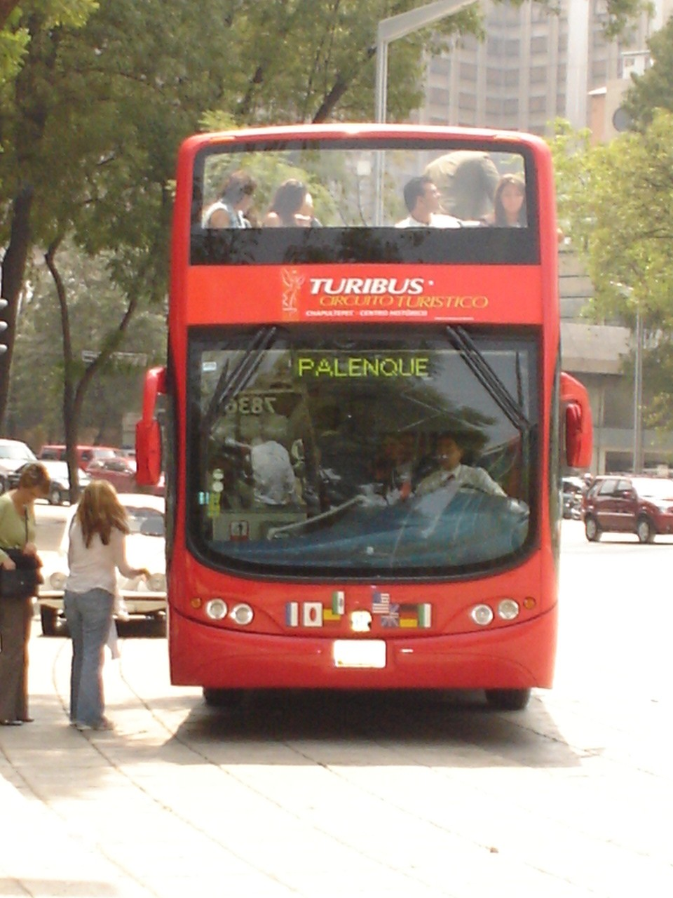 Frente de un TURIBUS, Ciudad de México